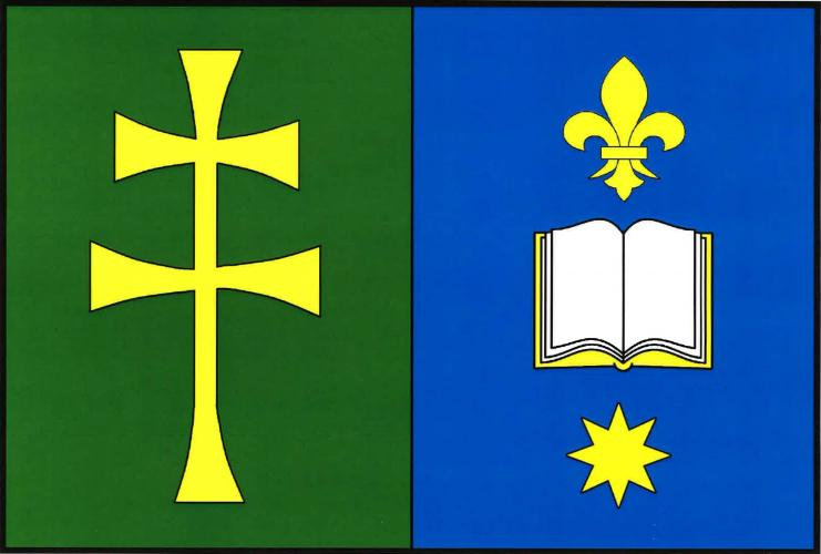 vlajka, Měcholupy (Plzeň-South District)